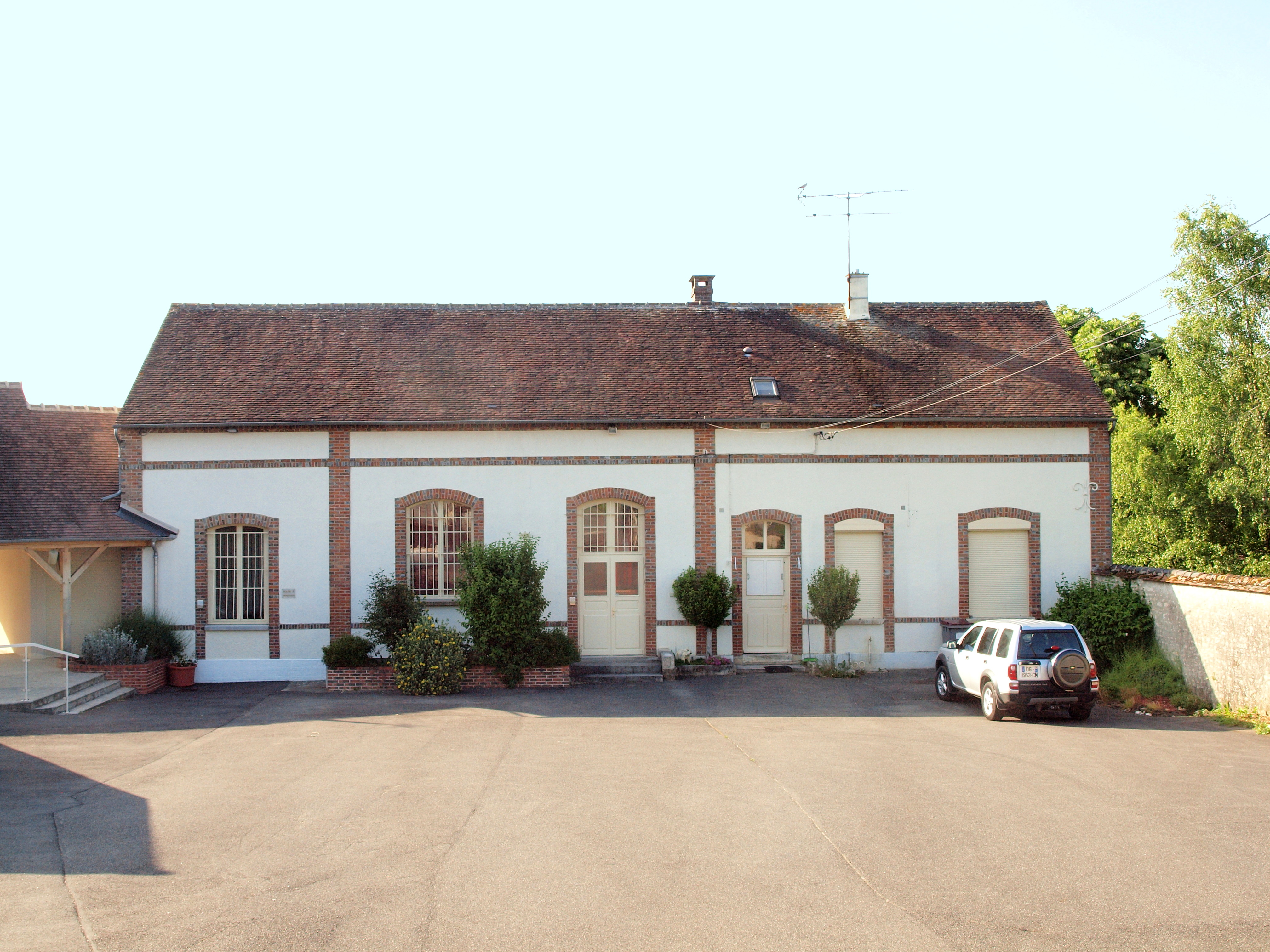 Mairie de Vaux-sur-Lunain (Seine-et-Marne, France)